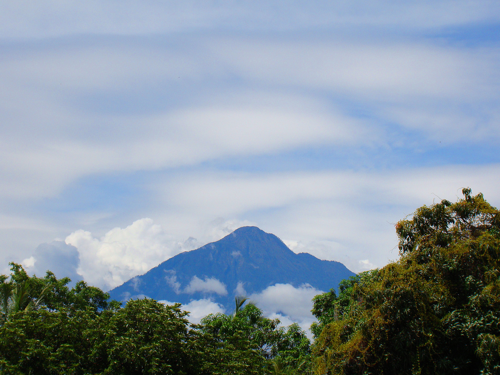 Volcán Tacaná, visto desde México.